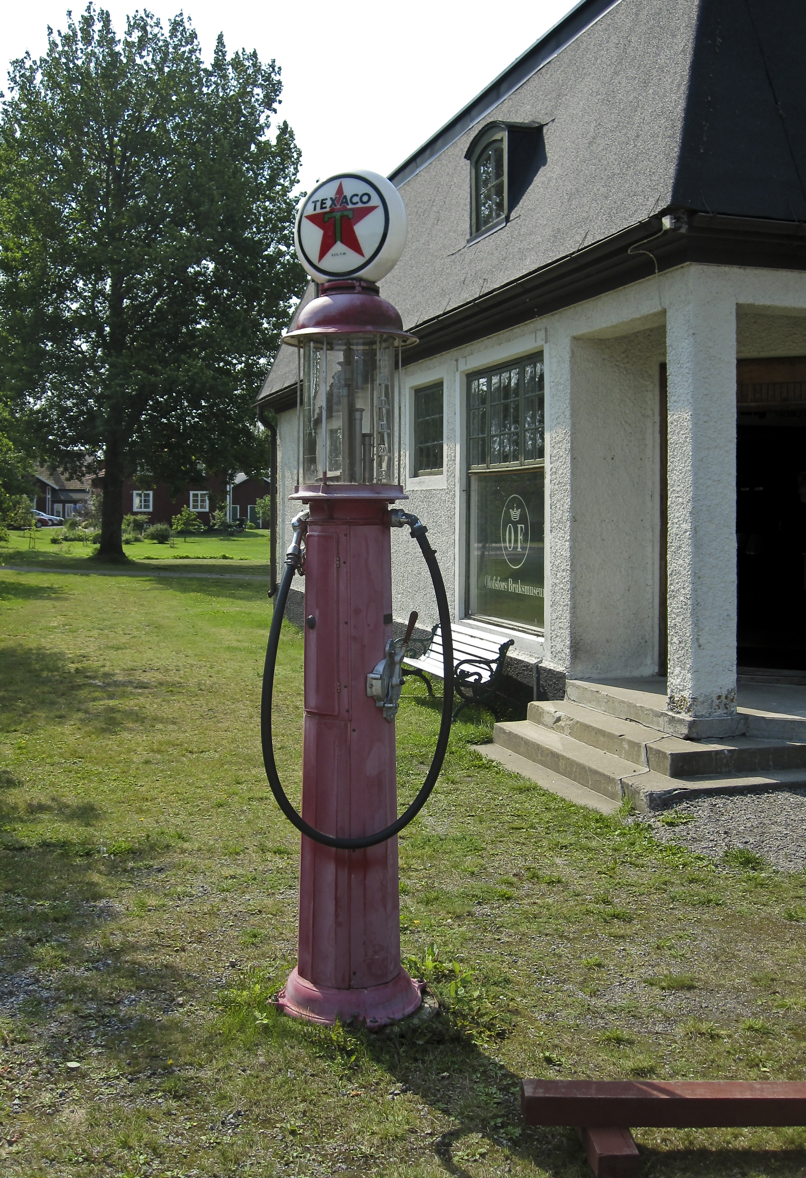 Bensinpumpen vid bruksmuseet vid Olofsfors bruk. Nordmaling. Sverige.